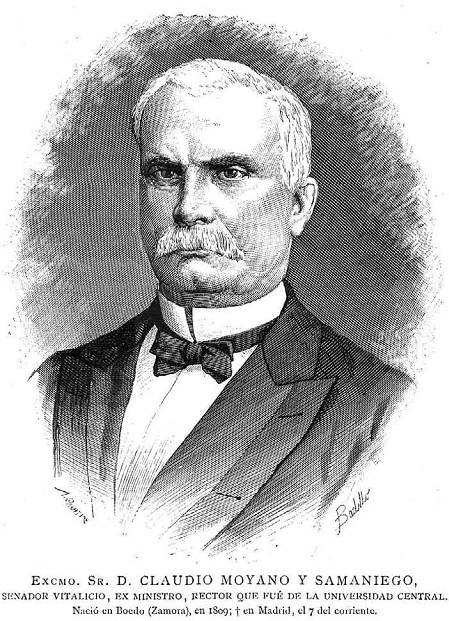 Retrato de Claudio Moyano y Samaniego, publicado en la revista española La Ilustración Española y Americana.